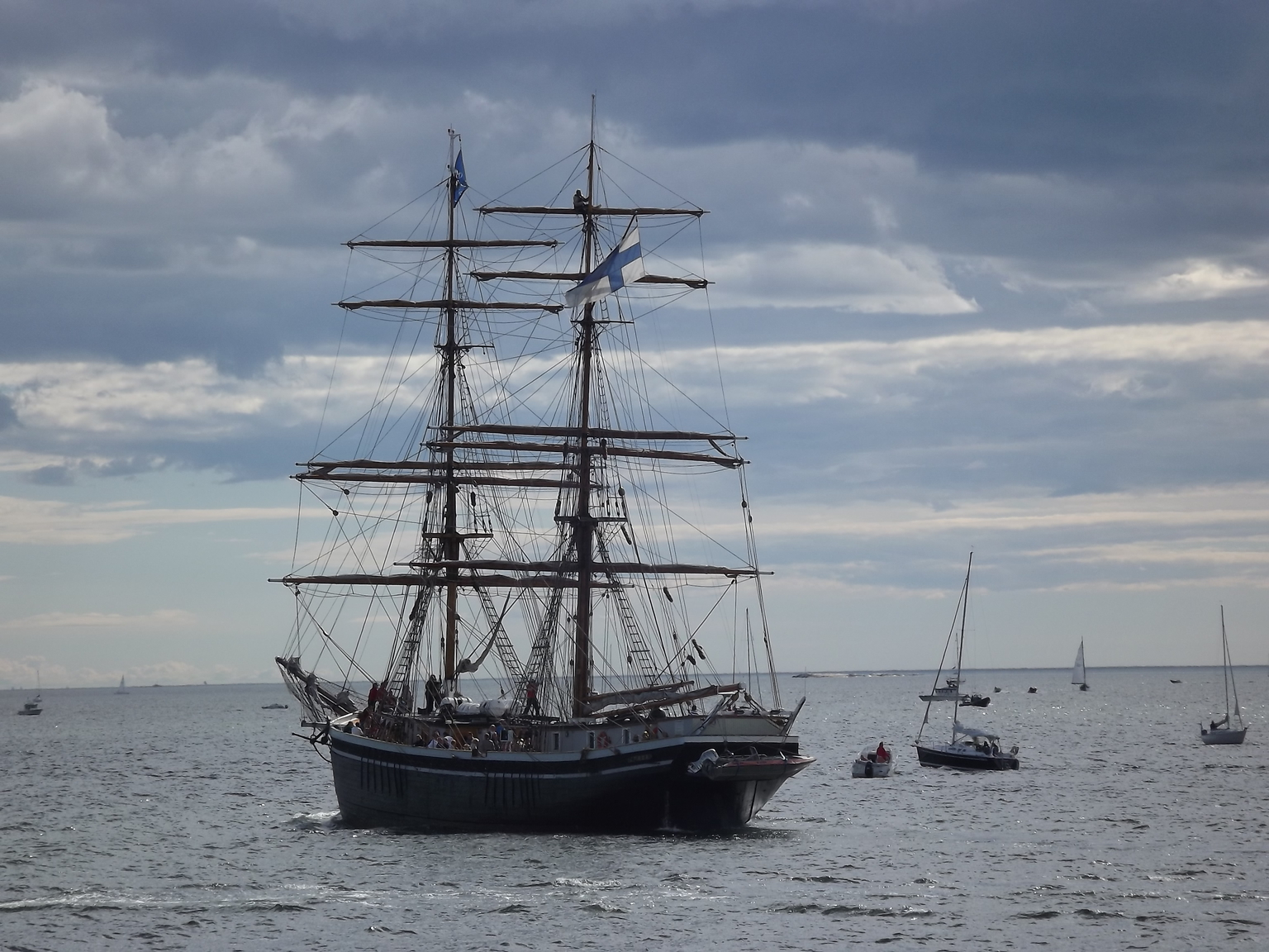 Briggen Gerda lämnar Helsingfors i "parade of sails" i Tall Ships' Races 2013.